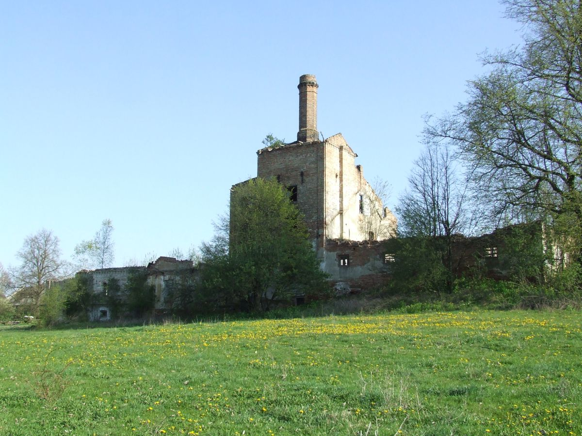 Stare Jeżewo - browar (założony przez Zygmunta Glogera) w zespole folwarcznym (zabytek nr 534 z 31.01.1983)